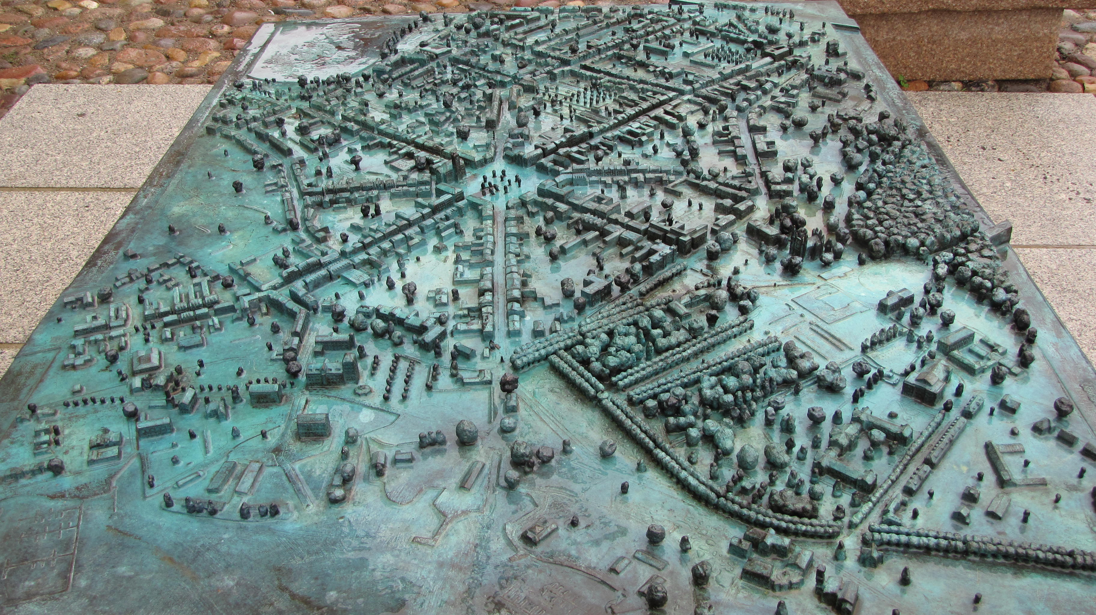 Stadtmodell mit Denkmal für Christoph Julius Löwe, 2010 geschaffen von Wolfgang Friedrich